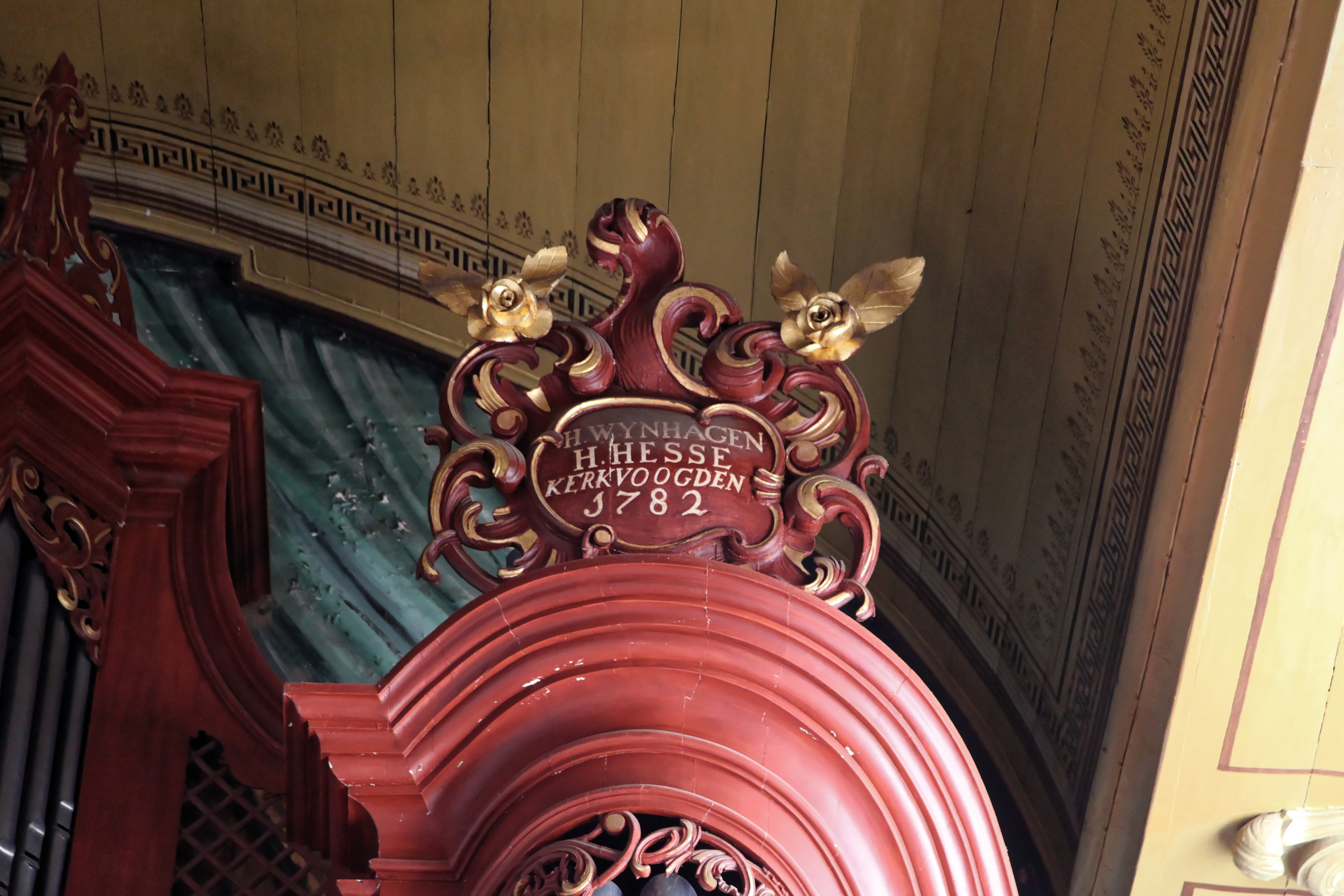 St.-Georgs-Kirche, Kirchplatz in Weener